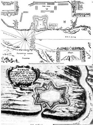 Фортеця Кодак на планах XVII ст.